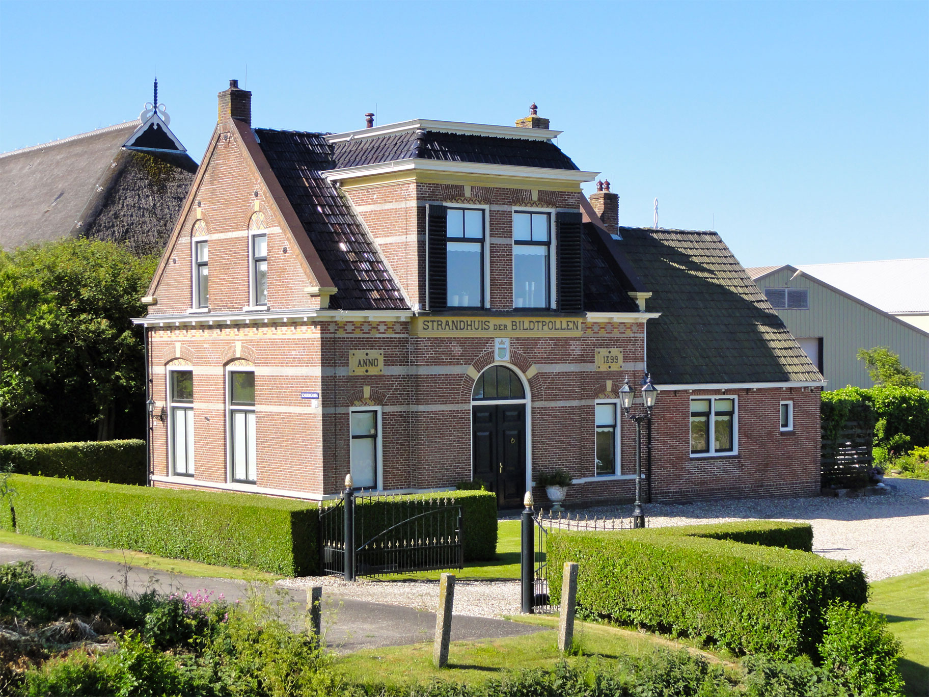 Schuringaweg 63 in Sint-Annaparochie